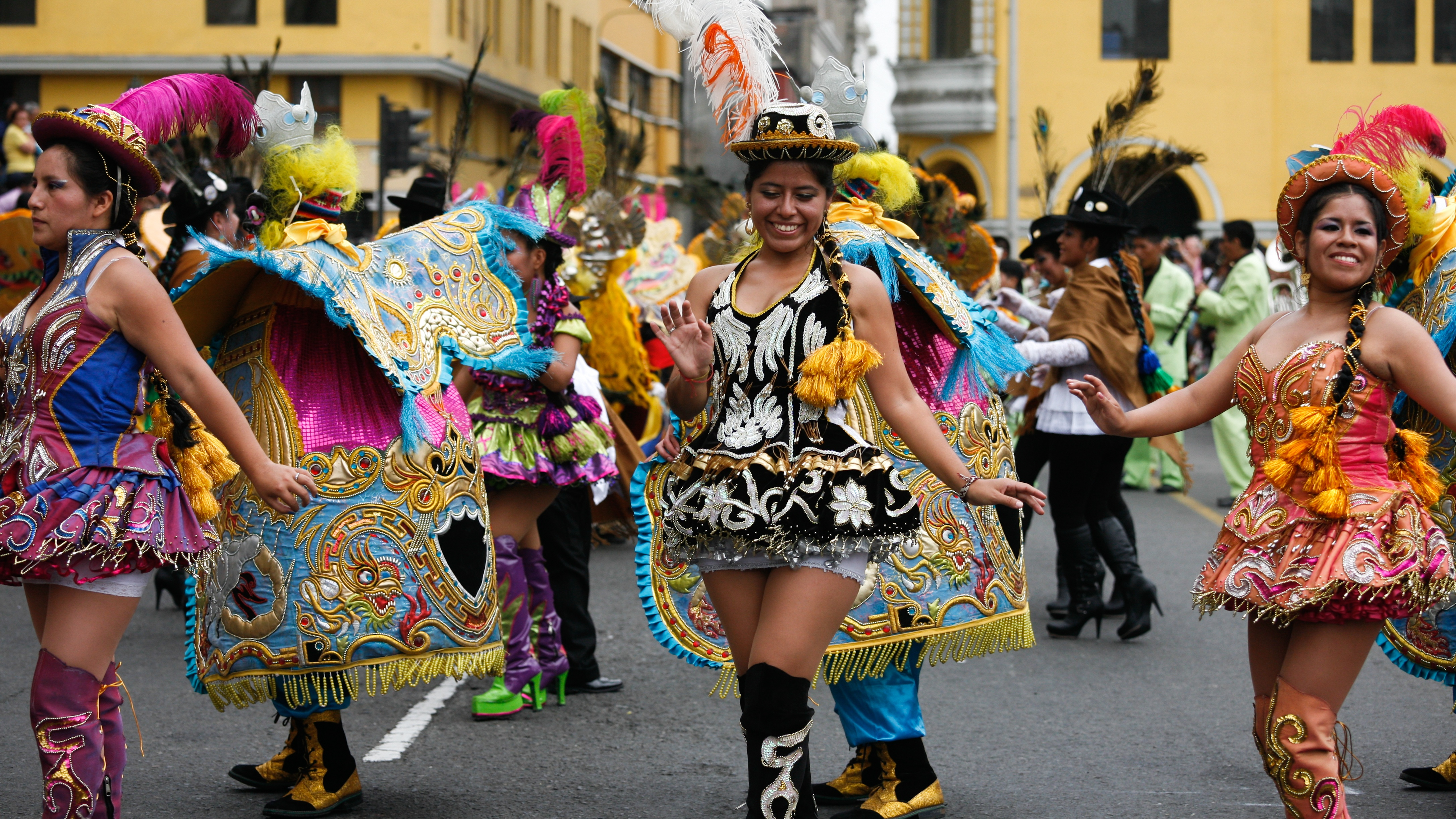 El Baile la Danza Saya